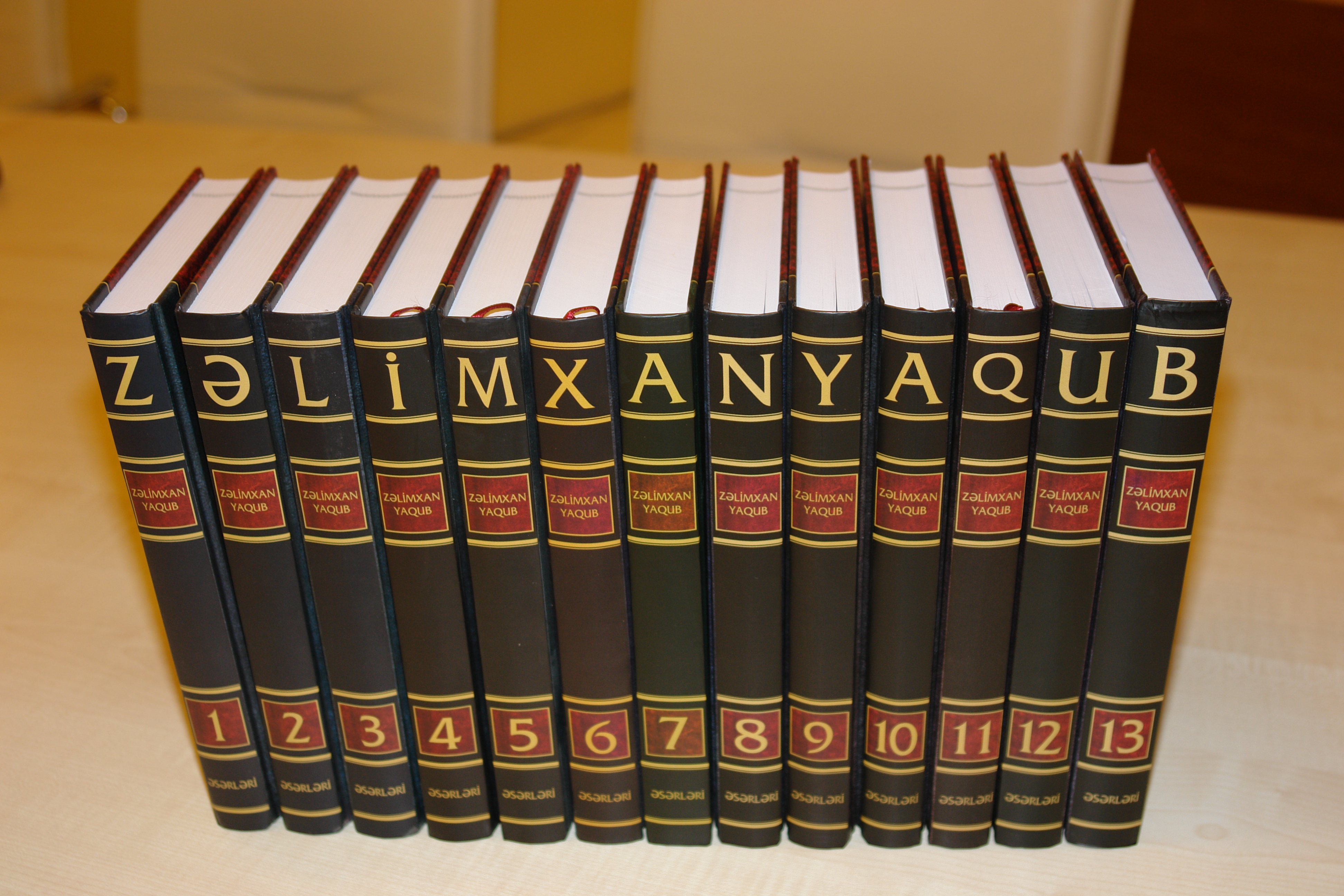 Zəlimxan Yaqubun 13 cildlik "Seçilmiş əsərləri"